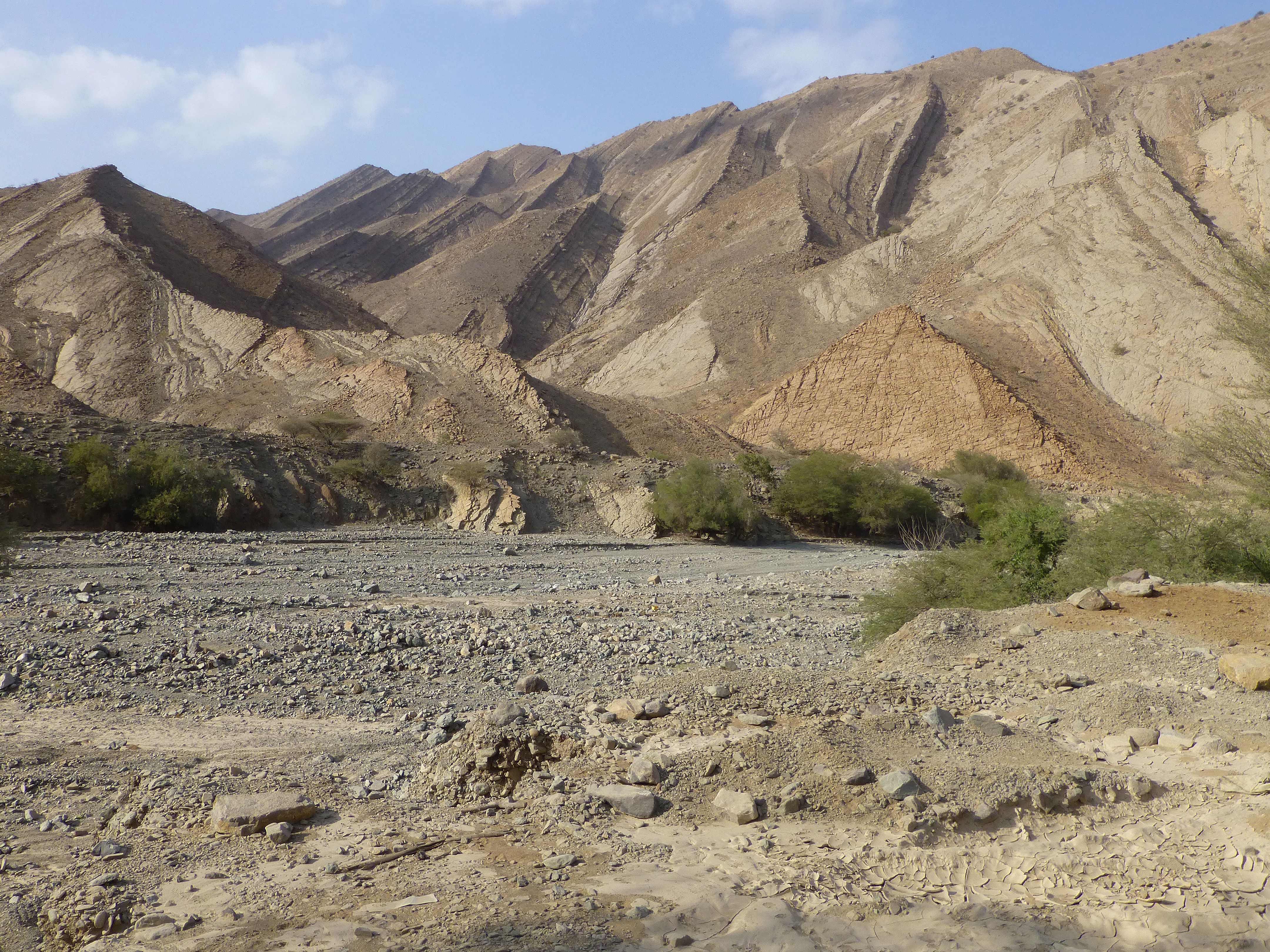 Ethiopie, région Afar : paysage entre Berhale et Ahmed Ela